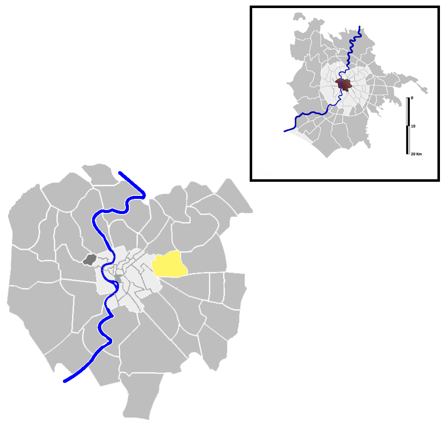 Tiburtino